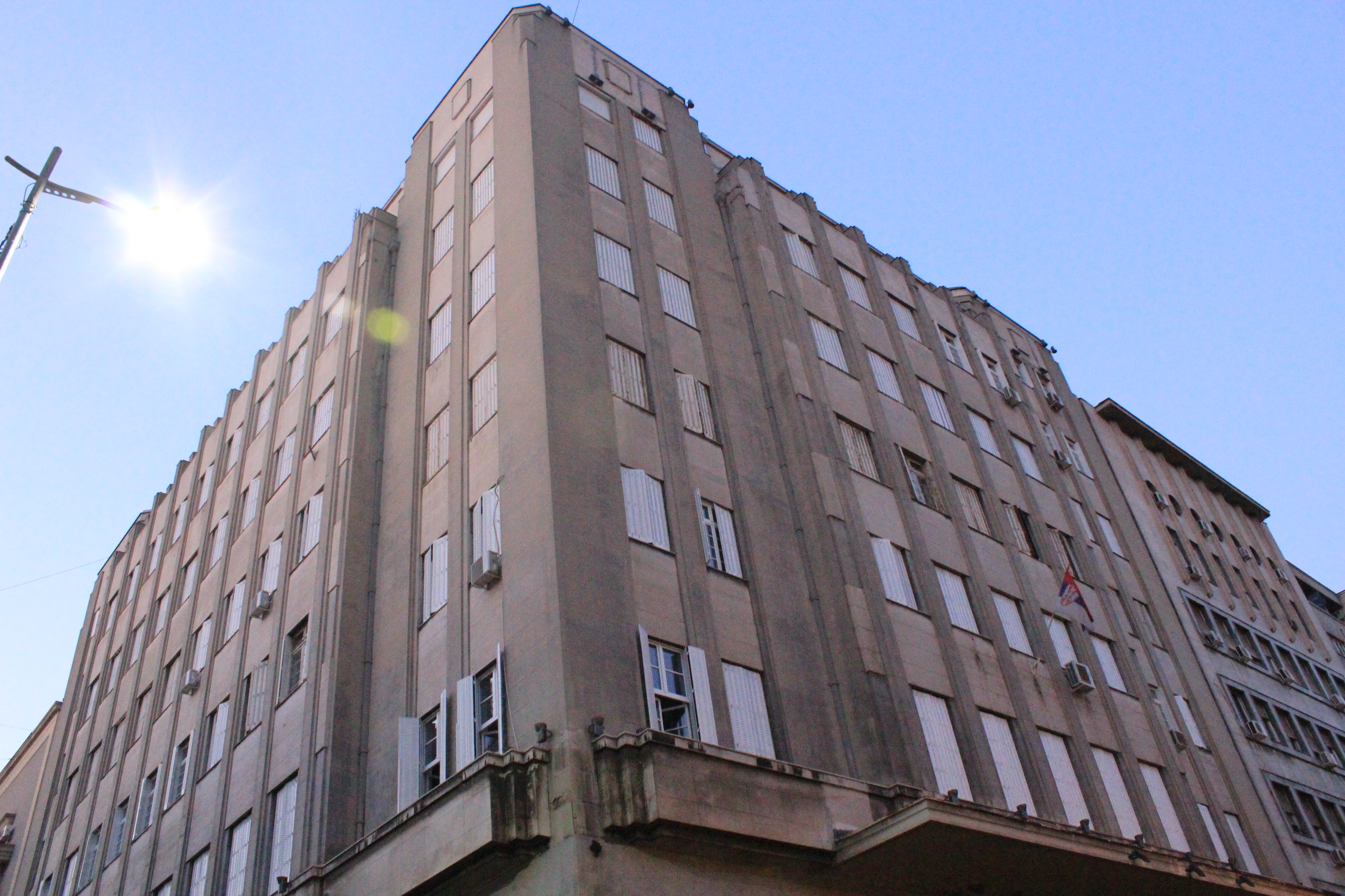 Etnografski muzej